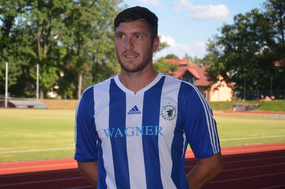 Pavel Fořt v dresu Domažlic